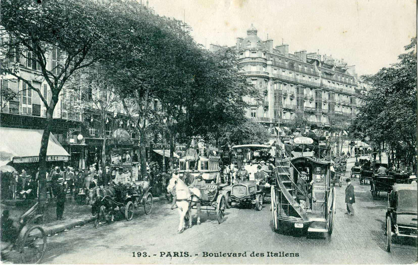 Carte postale ancienne sans nom d'éditeur, N°193 Paris - Boulevard des Italiens Vues, de gauche à droite, de deux voitures à cheval (victoria, cabriolet), d'une automobile, d'un omnibus à impériale de la CGO (vue par l'arrière en direction de la Gare de Lyon